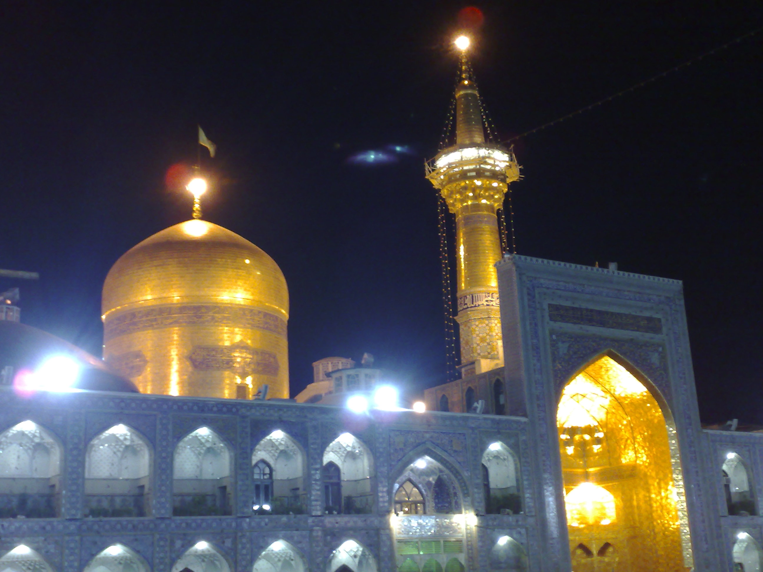 ایران - مشهد مقدس - حرم امام رضا (ع)